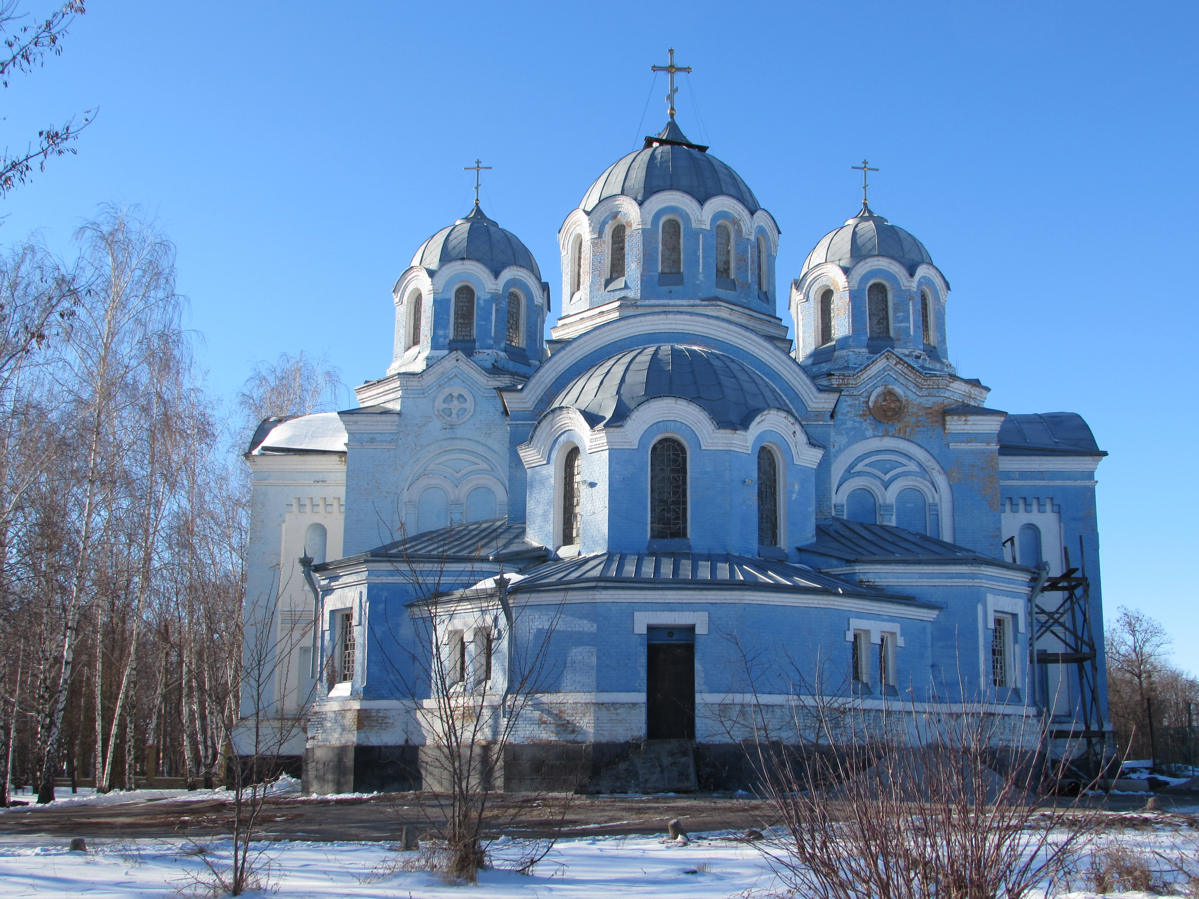 Свято-Вознесенський собор, Бобринець, вул. Дзержинського, 36